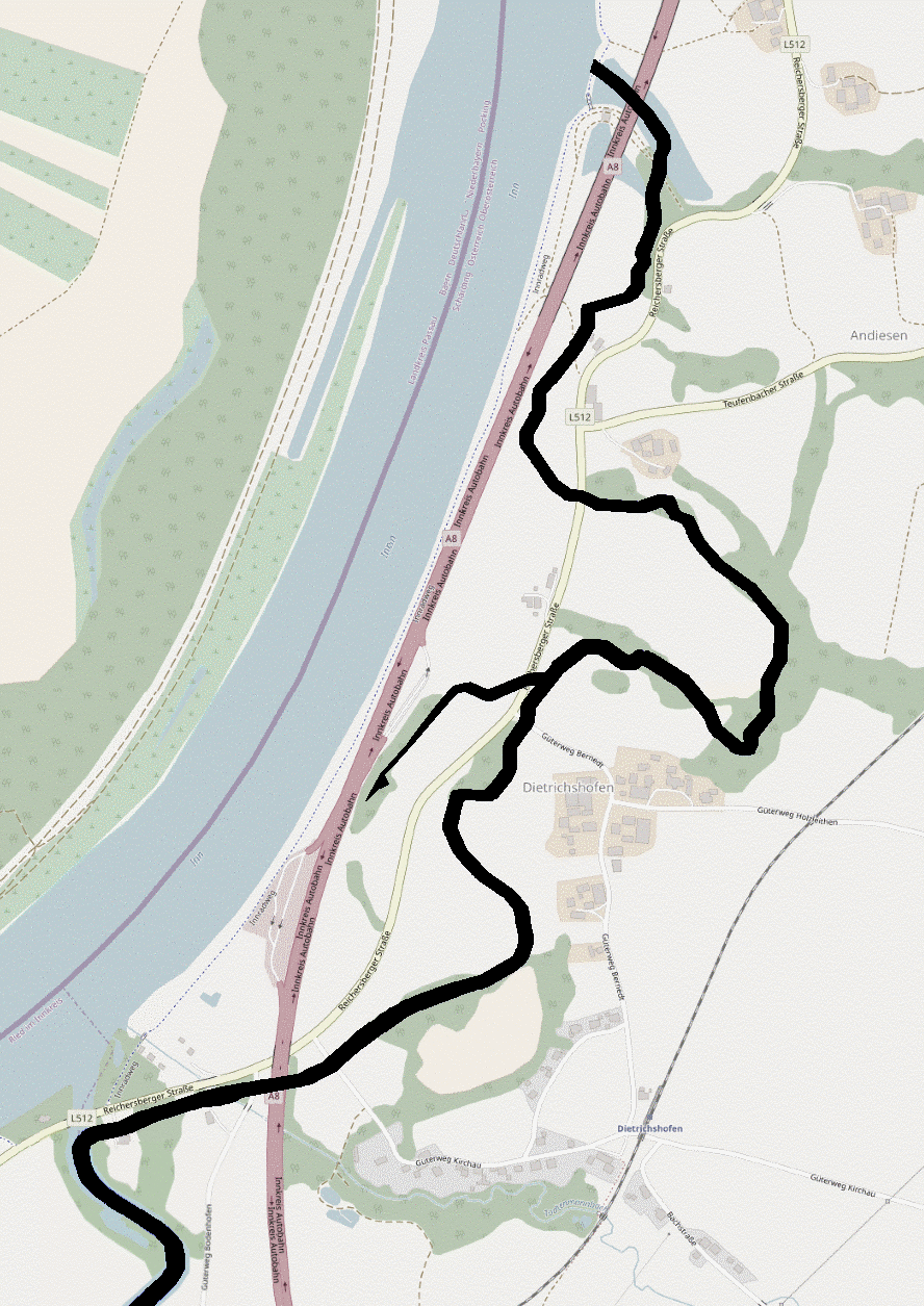 Rekonstruktionsvorschlag von Dr Christopher Rhea Seddon für den Verlauf des Flussbettes der Antiesen bis 1612 auf Basis der Urmappe des Franziszeischen Katasters und Theodor Ebner, Die Antiesenmündung, in: Jahrbuch des oberösterreichischen Musealvereines 148 (2003), S. 257-284. Kartographische Darstellung basierend auf OpenStreetMap (© OpenStreetMap-Mitwirkende).